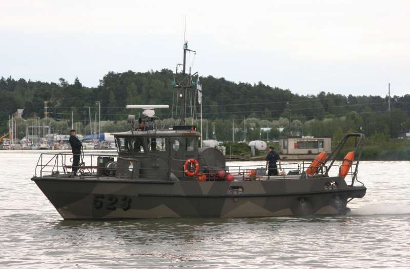 kiiski ship